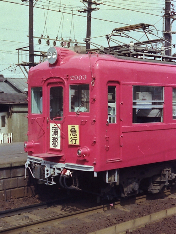 名鉄ク2900形電車